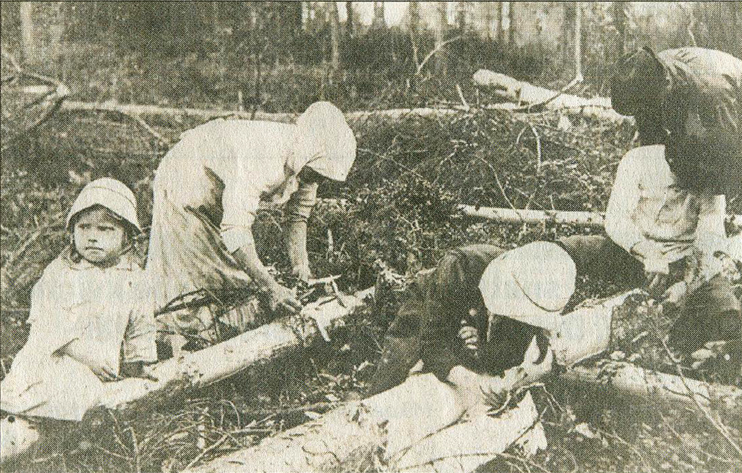 Bark bread has often been used as emergency food in Finland. A family in Savonia shells bark after the War of liberty in 1918.